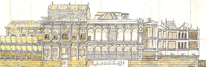 La casa consistorial de Sevilla en 1730. La parte izquierda del edificio, donde está el arquillo, estaba tapada entonces por unas gradas colocadas con motivo de una corrida de toros en la plaza de San Francisco.